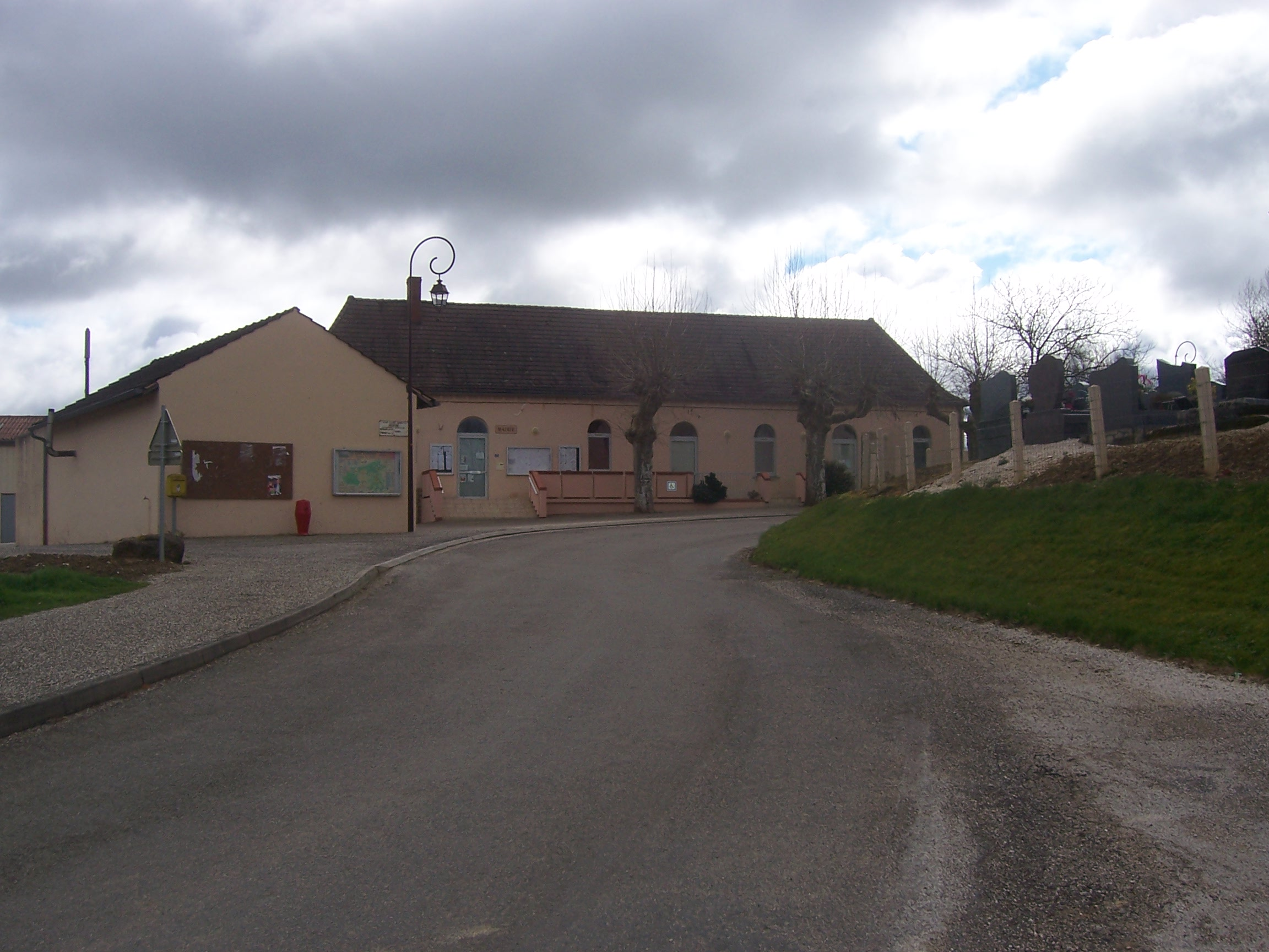 Mairie de Diconne